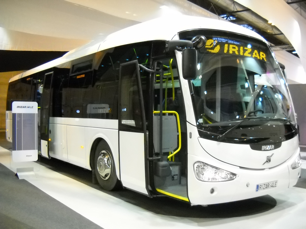 Irizar i4LE. FIAA 2010.